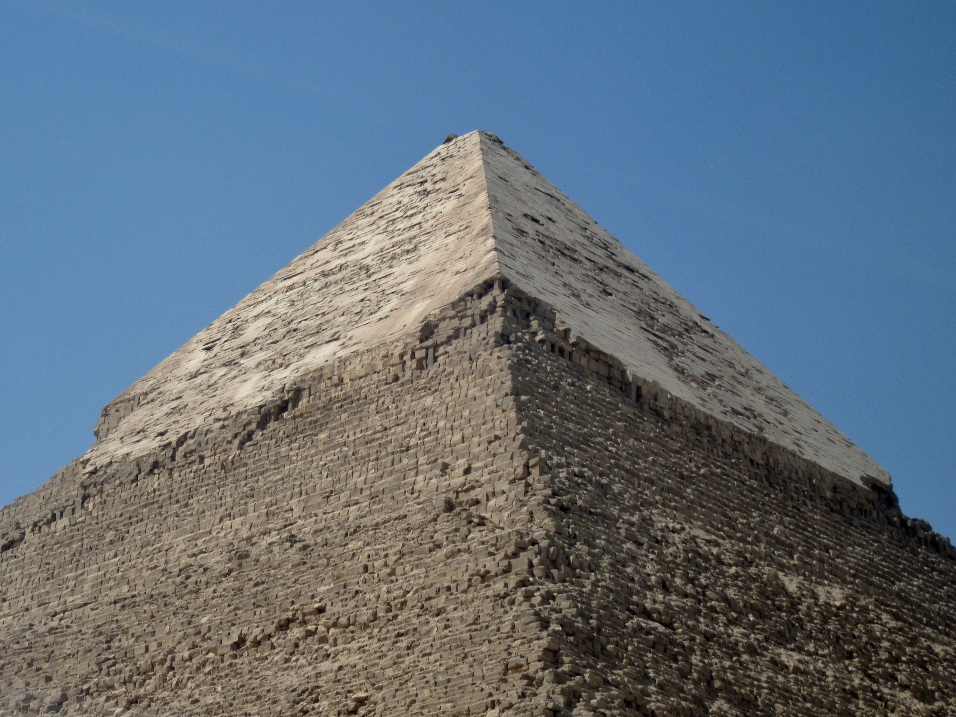 Nordostseite der Spitze der Chephren-Pyramide auf dem Giseh-Plateau bei Kairo, Ägypten